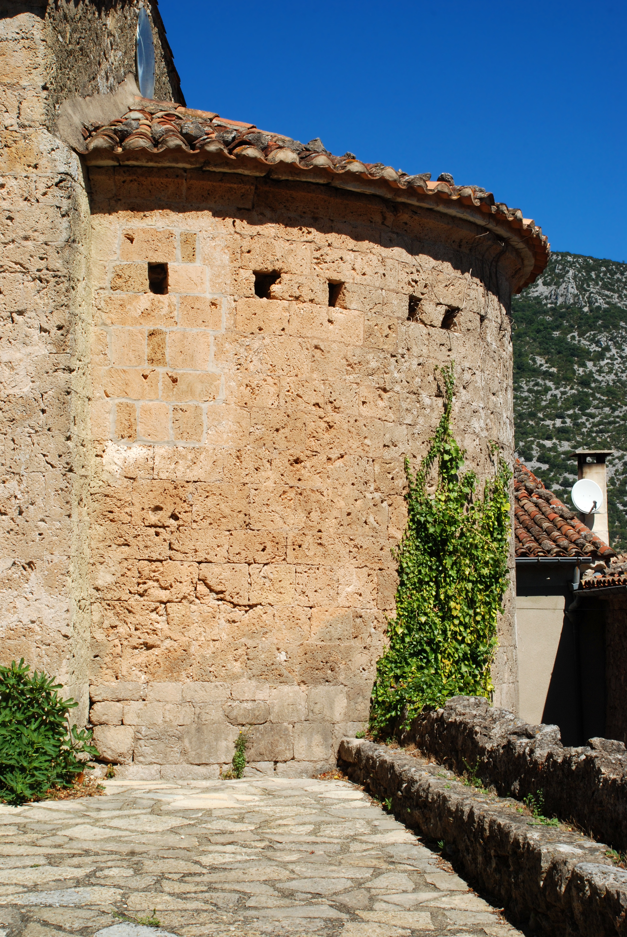 France - Hérault - Église Notre-Dame de Pégairolles-de-Buèges